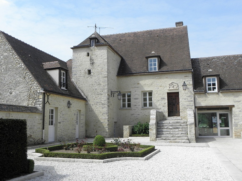 Mairie de Morigny-Champigny (91).